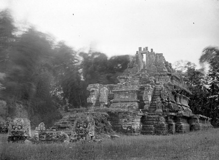 Negatief. Tempel Jago, Malang, Oost-Java